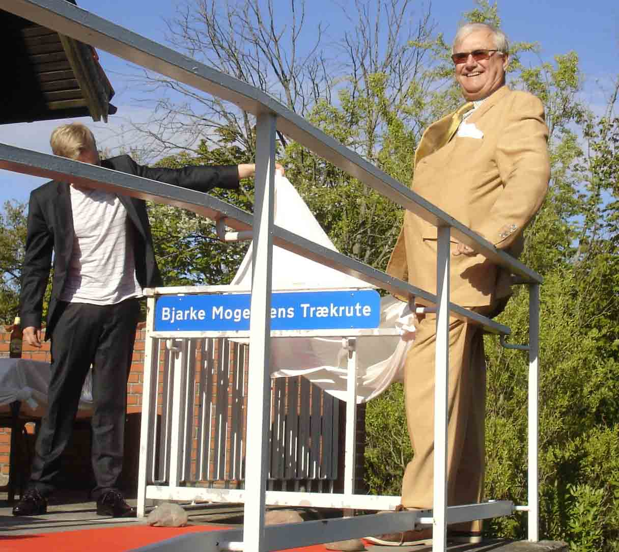 Bjarke Mogensen og Hans Kongelige Højhed Prins Henrik afslører skiltet med Bjarke Mogensens Trækrute efter at Bjarke Mogensen er kåret som æreskunstner i Østermarie 2016